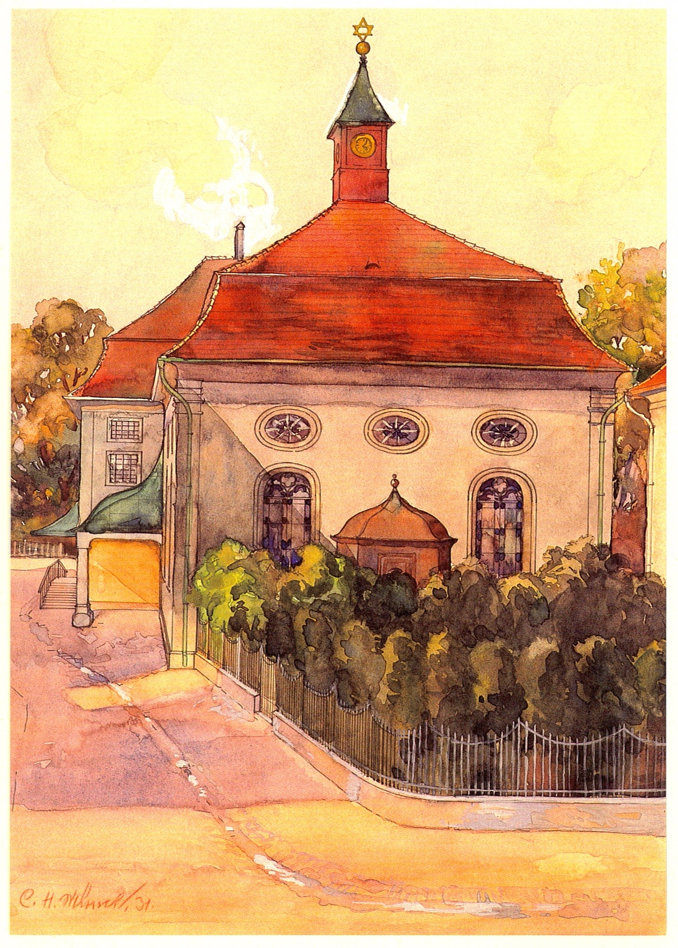 Aquarell der Synagoge von Hohenems ) 1931